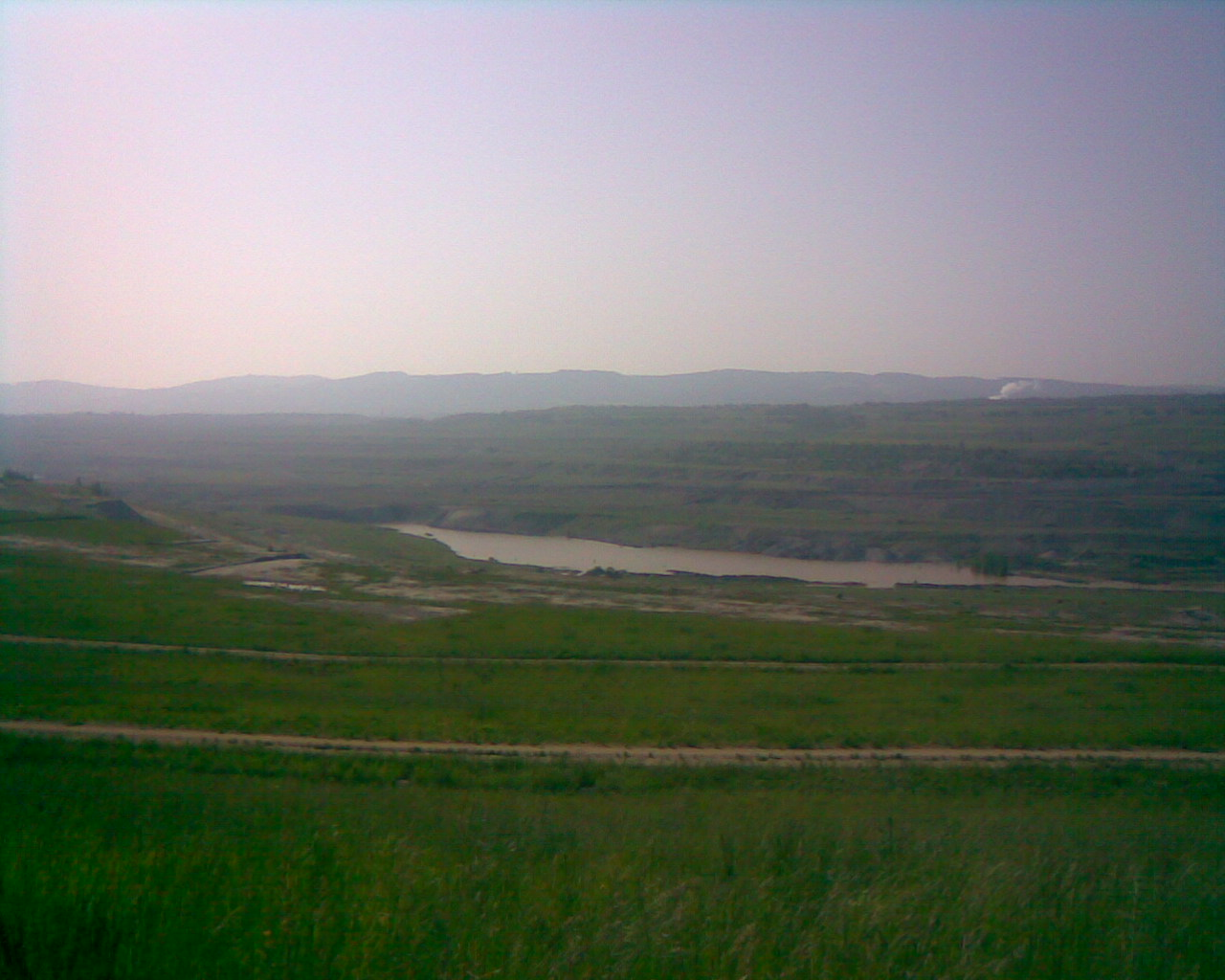 Výhled na budoucí jezero Medard